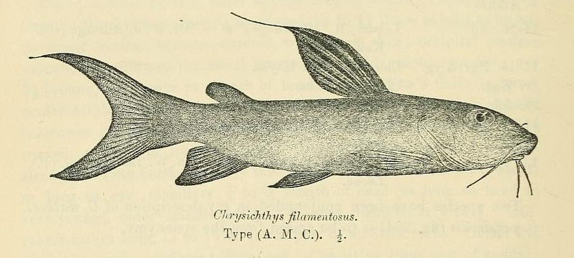 Chrysichthys auratus syn. C. filamentosus